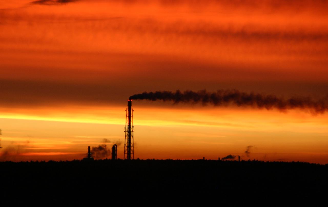 Huta Miedzi Legnica – najstarsza huta miedzi na terenie Polski. Położona w Legnicy. Object location51° 10′ 58″ N, 16° 06′ 52″ E